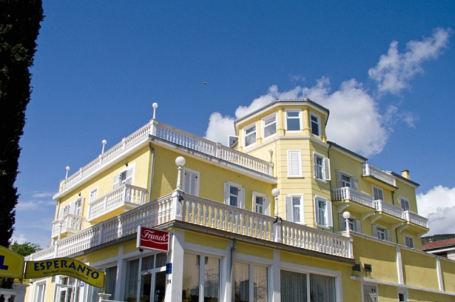 hotel Esperanto u Selcu